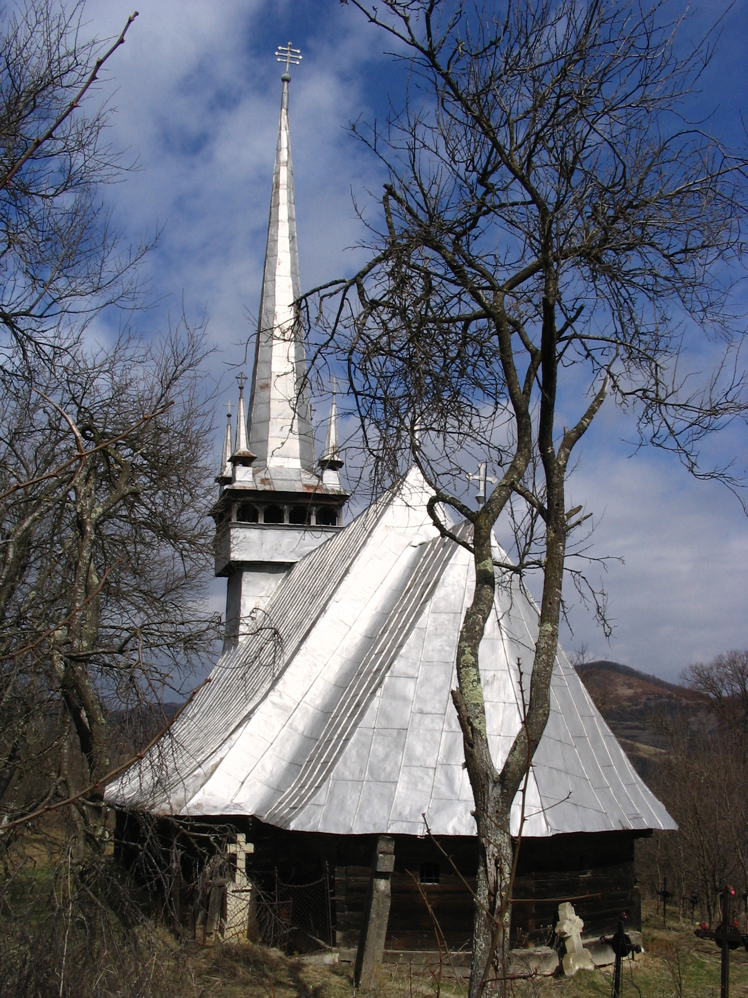 Biserica de lemn din Dragu, judeţul Sălaj. Autor: Bogdan Ilieş Data: mai 2006